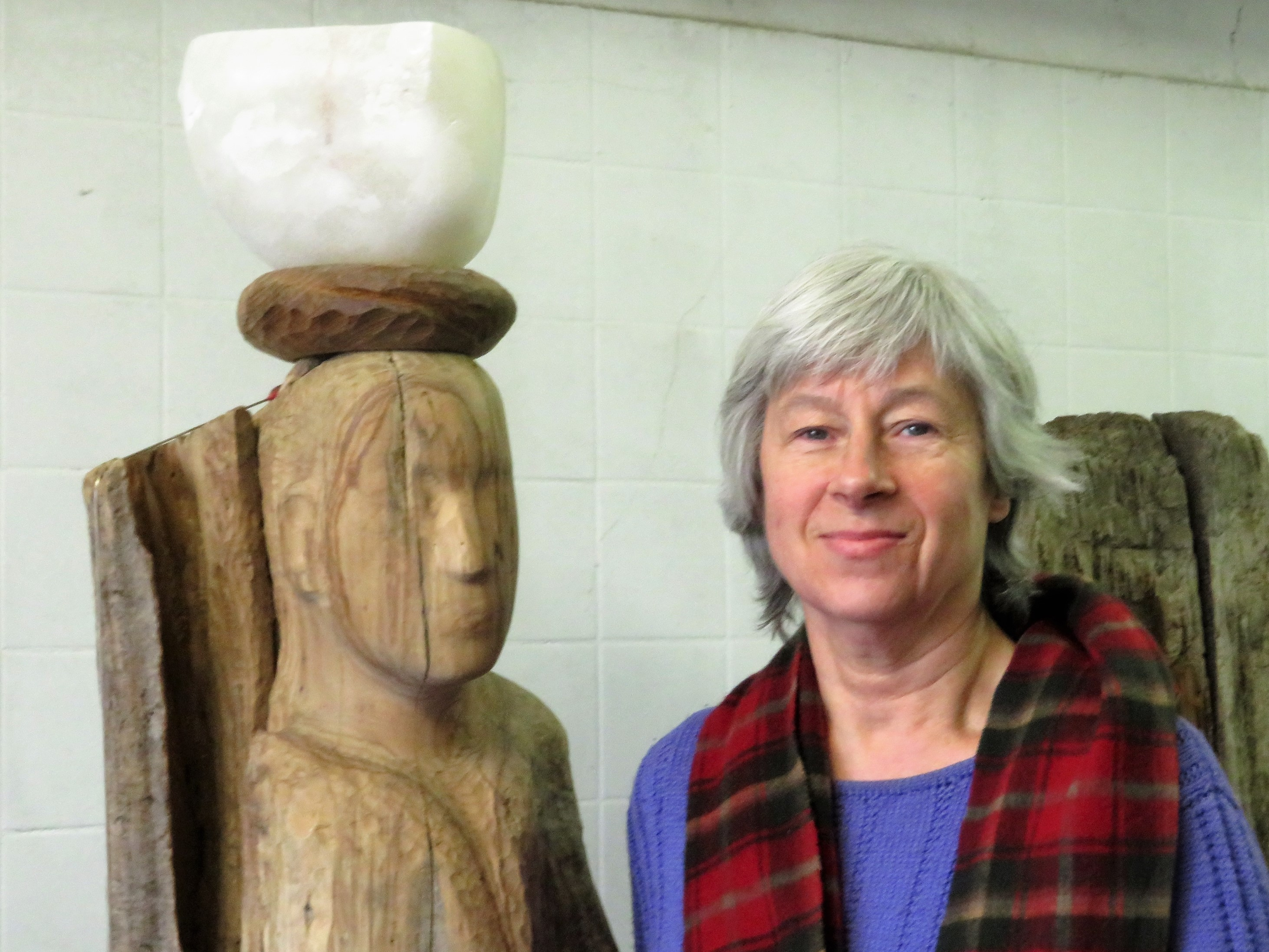 Hanneke de Munck, Nederlands beeldhouwer